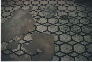 Reggio Calabria Roman Baths, central mosaic